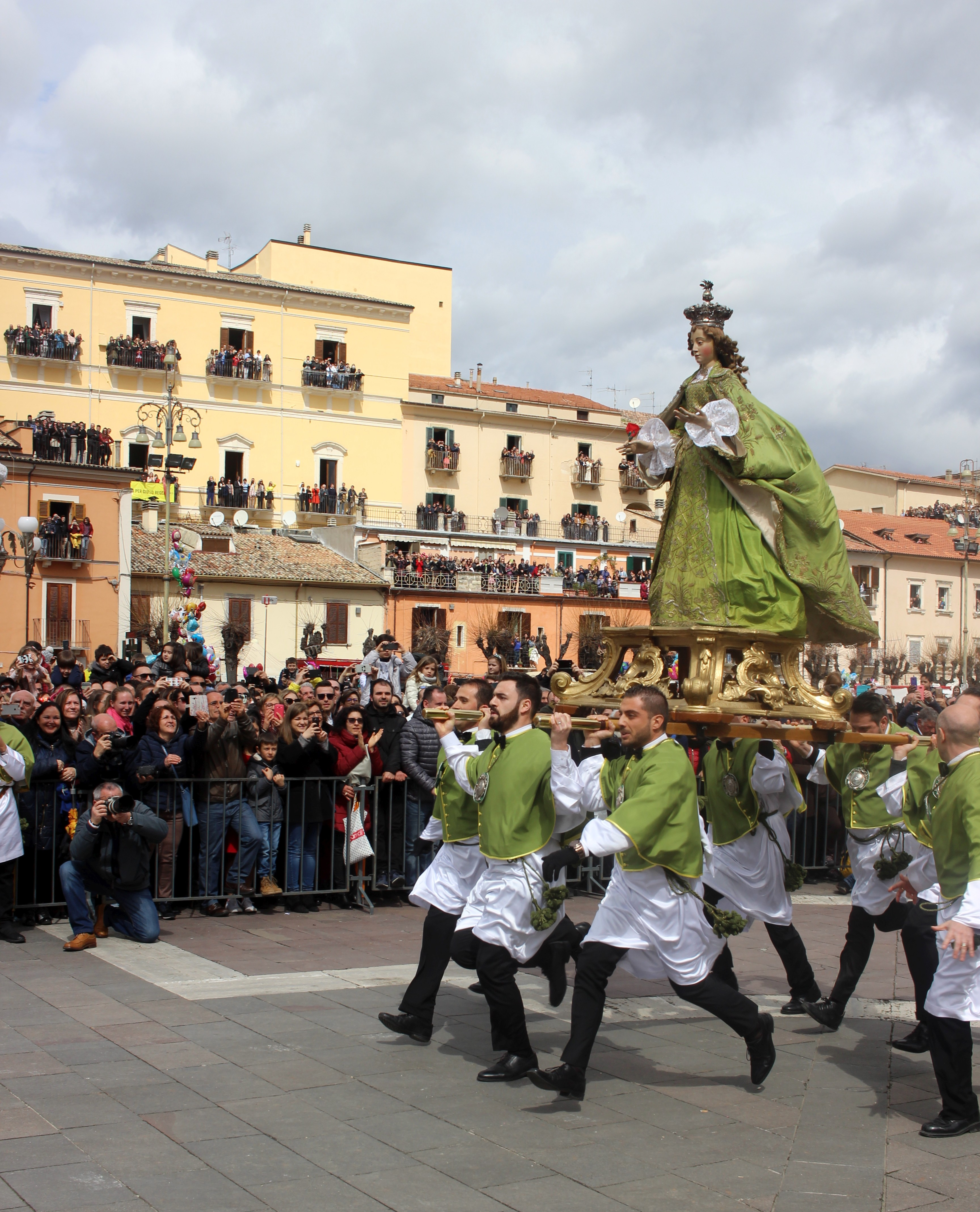 La madonna che scappa in piazza 2018